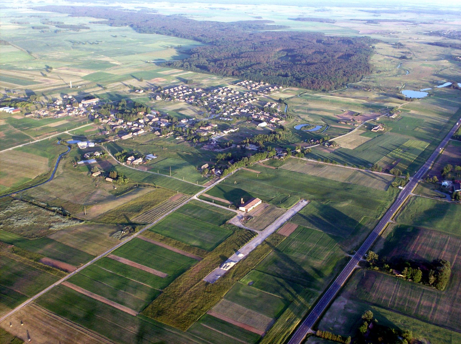 Kalnas, Pasvalio r. Fotografuota 2008-06-08.